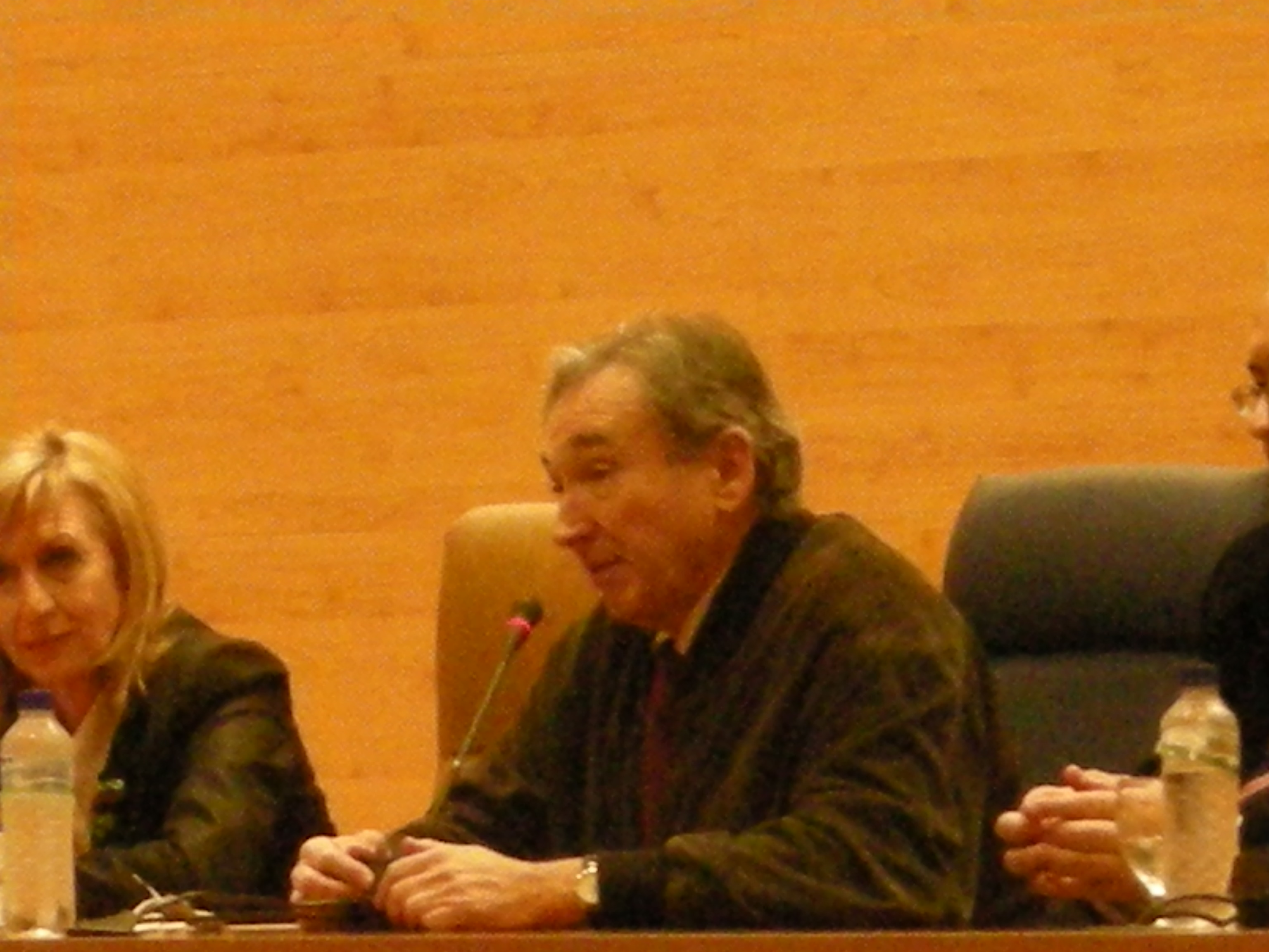 Antonio Elorza en una conferencia de Rosa Díez en la Facultad de Ciencias Políticas de la Univerisidad Complutense de Madrid